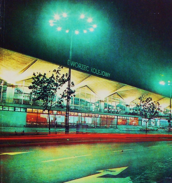 Katowice - dworzec kolejowy w 1973r.